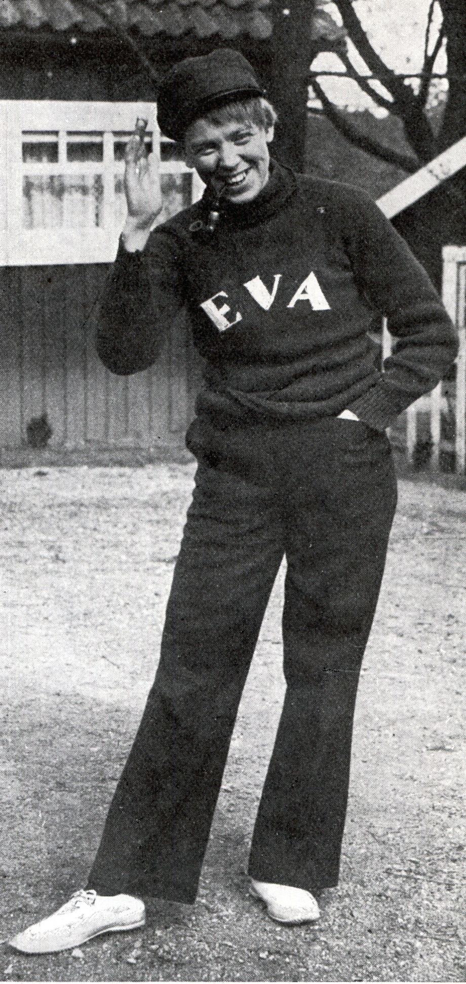 Bellan Roos (1901-1990) som Gurra i För fulla segel på Klippans friluftsteater. (Scenen 1927).